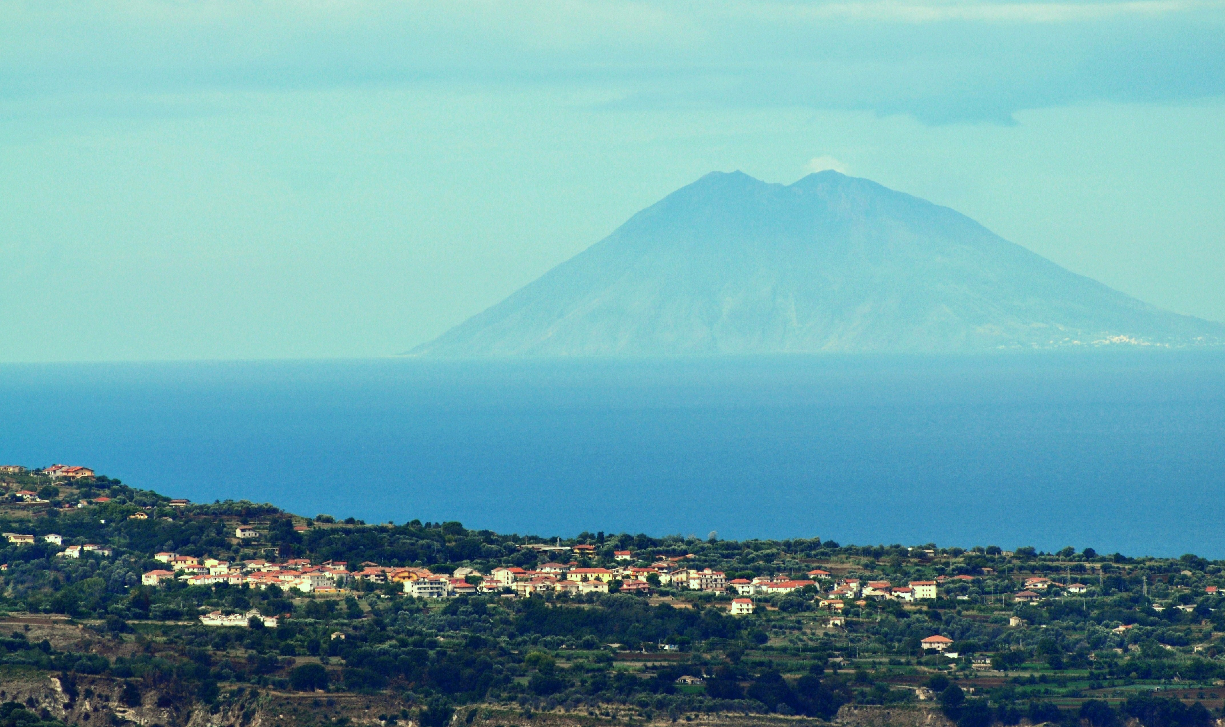 Zambrone paese della provincia di Vibo Valentia in Calabria.